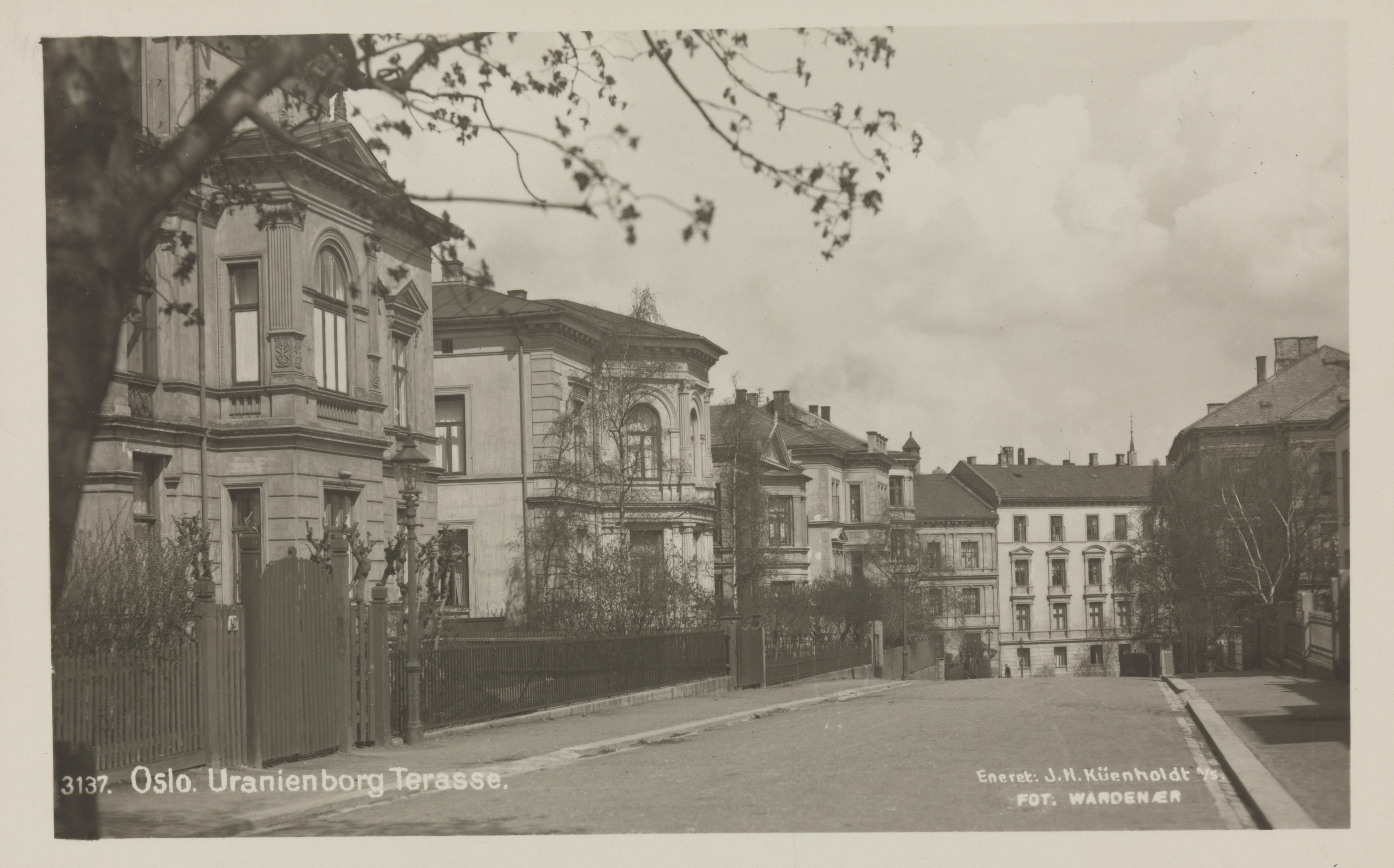 Bildet er hentet fra Nasjonalbibliotekets bildesamling Uranienborg,Uranienborg terrasse, Oslo, Oslo